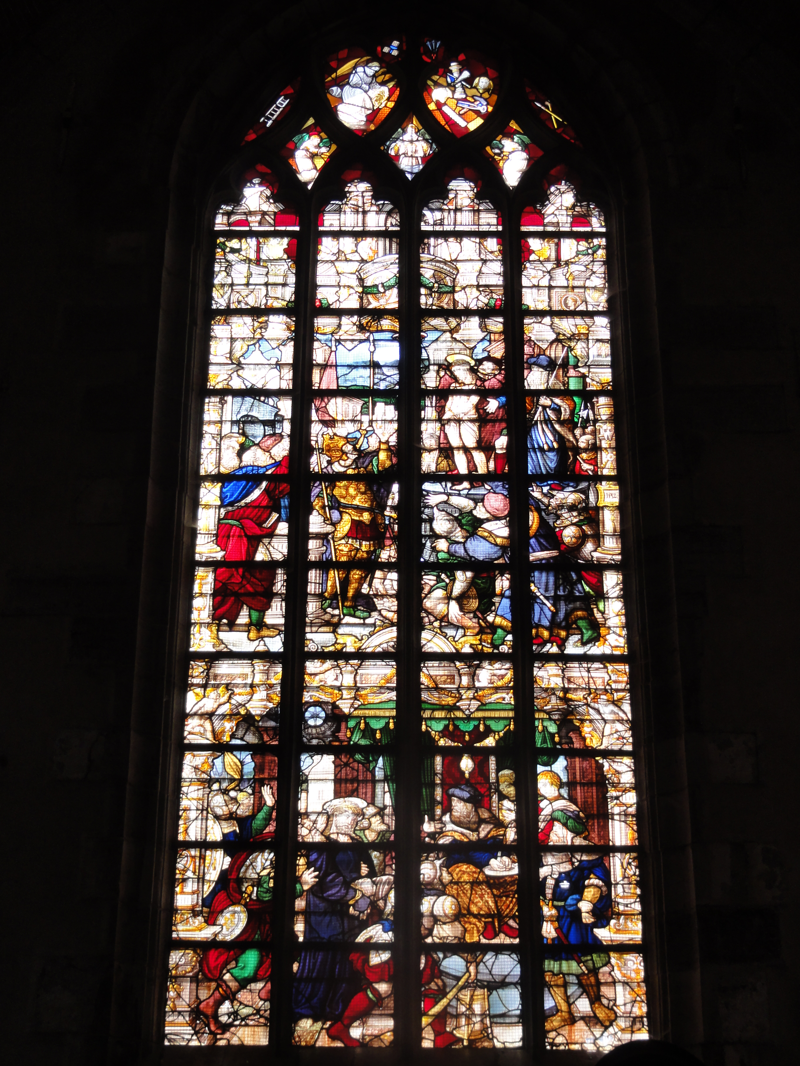 Solre-le-Château (Nord, Fr) église, vitrail Christ devant Pilatus